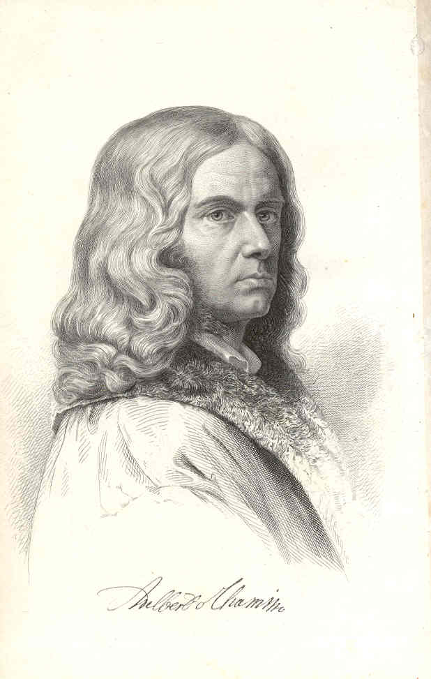 Adelbert von Chamisso Kupferstich